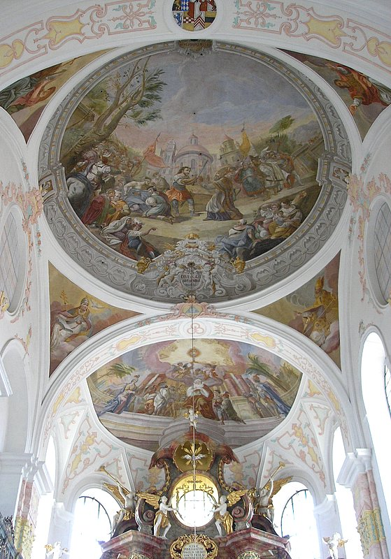 Pfarrkirche St. Nikolaus (Bernbeuren, Landkreis Weilheim-Schongau, Oberbayern). Fresko im Chor, (1775). Eigene Aufnahme, Feb. 2007 / Parish church St. Nikolaus (Bernbeuren, Upper Bavaria, Germany). Great fresco (Choir, 1775). Own photo, Feb. 2007